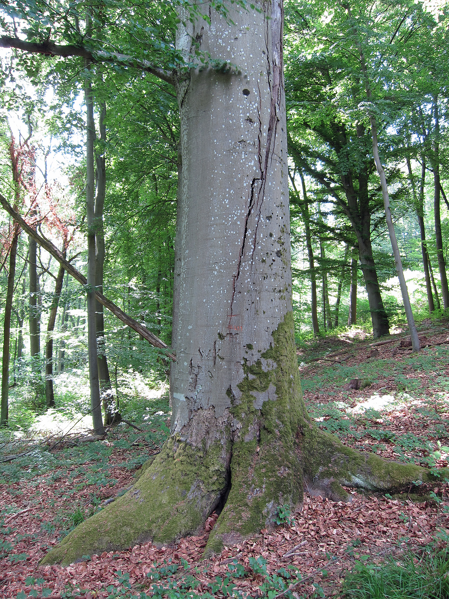 Dicke Buche am Hüttenweg bei Sulzthal